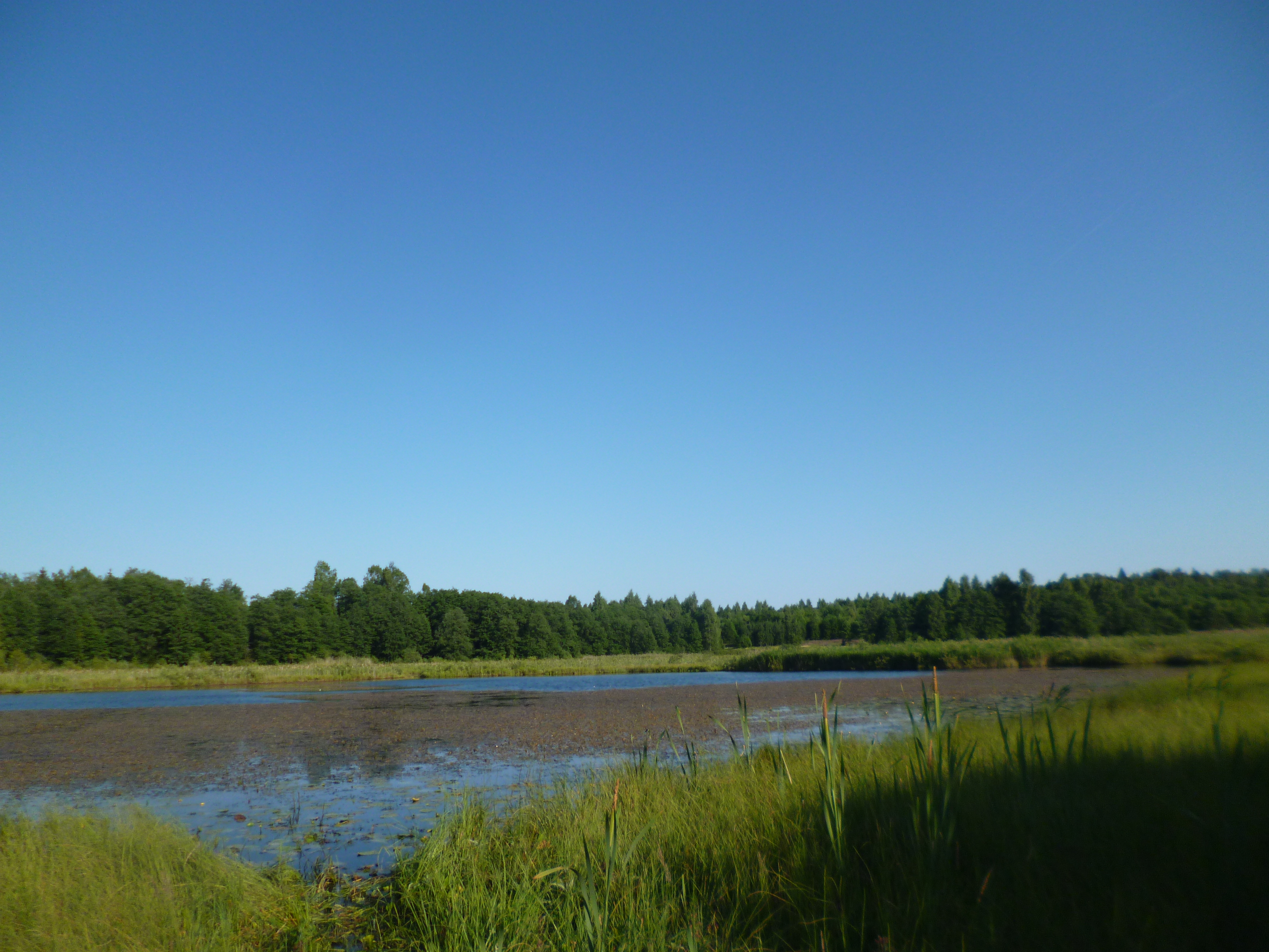 Верховское озеро